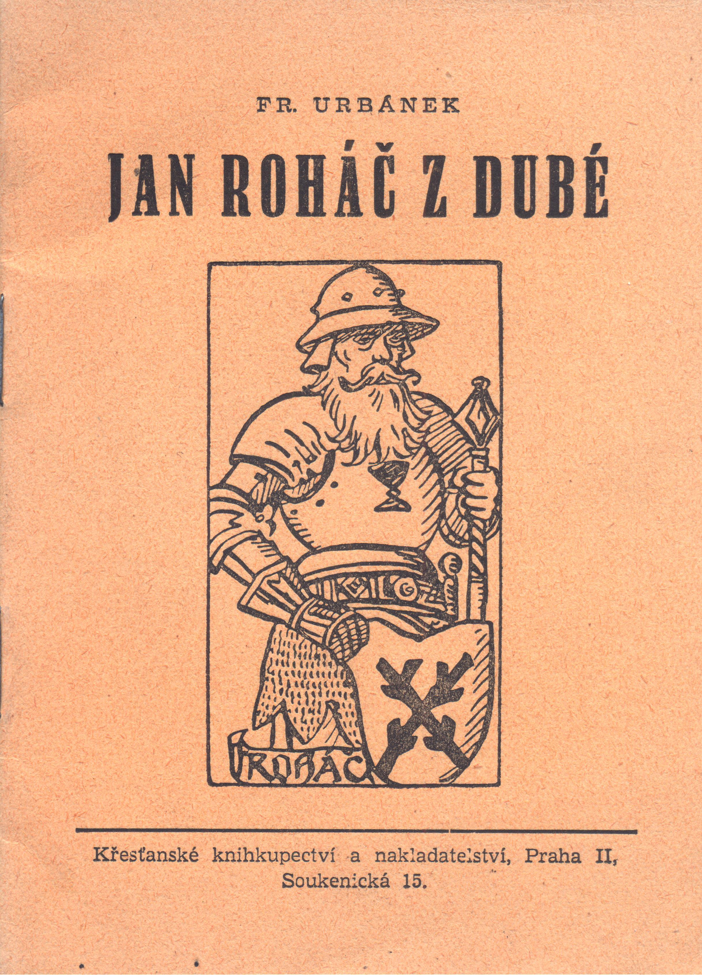 Přebal knihy Jan Roháč z Dubé od Fr. Urbánka.